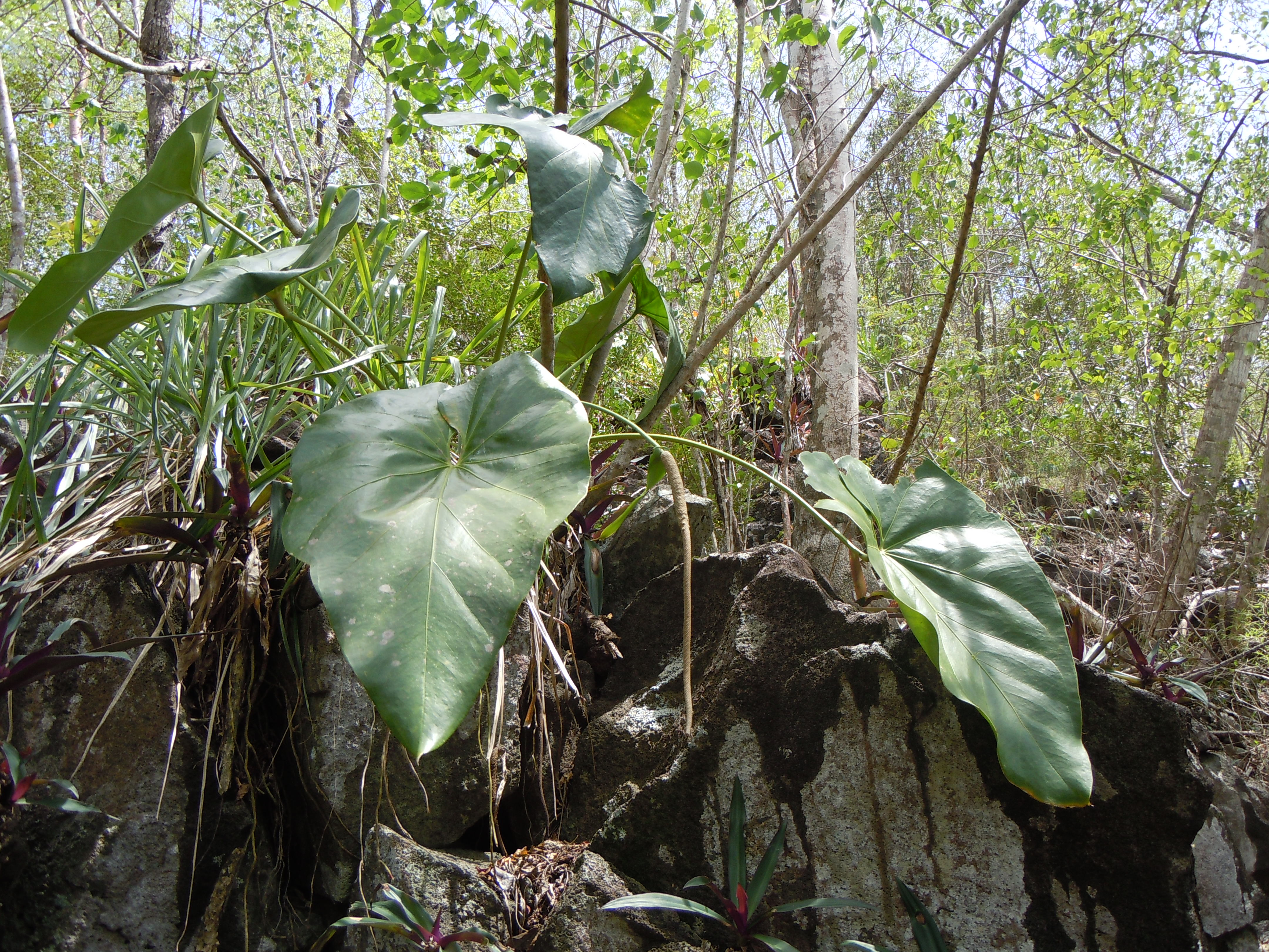 Anthurium grandifolium - Guadeloupe - Forêt de Malendure à Anse Colas - Bouillante